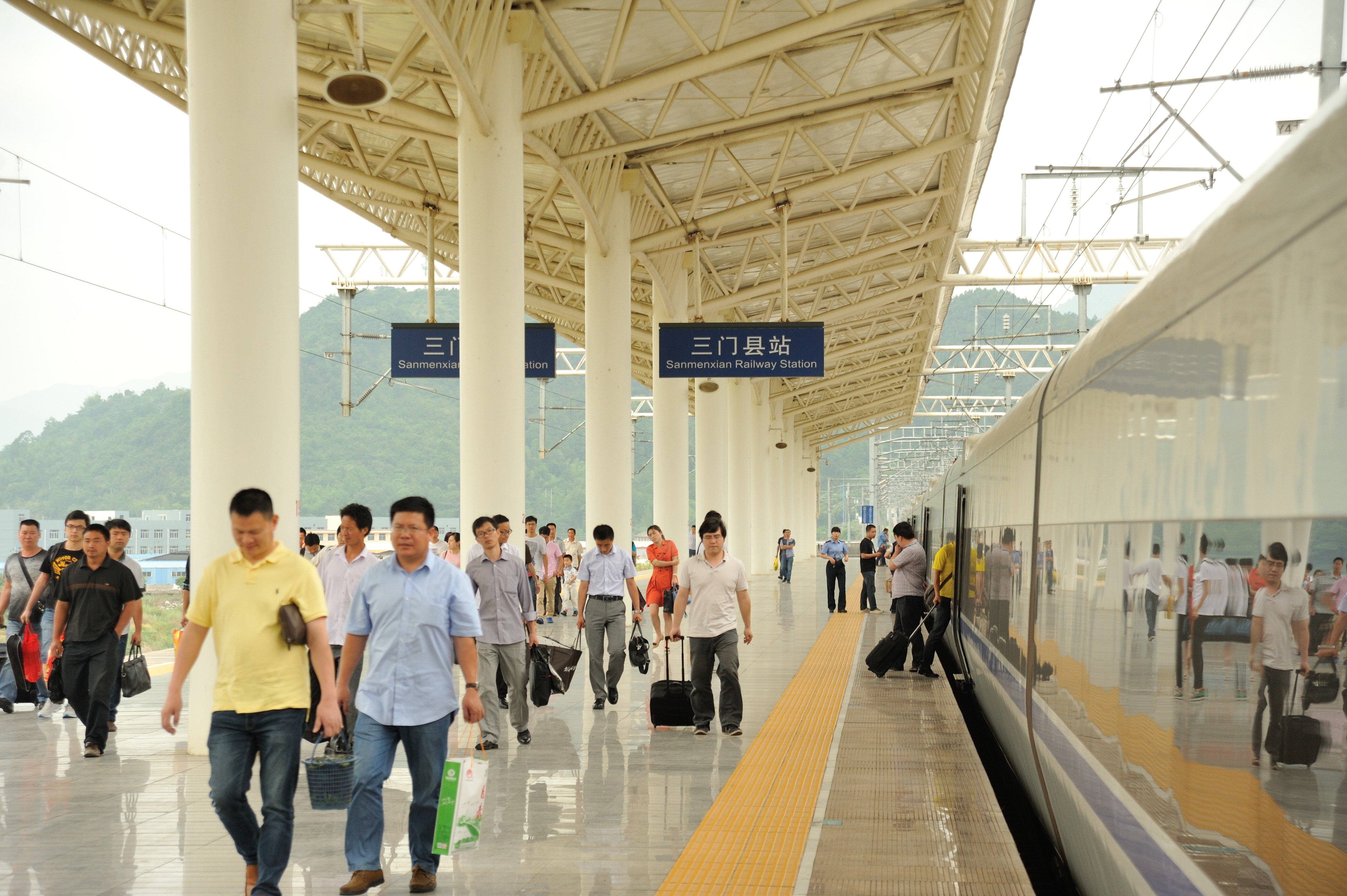 三门县站站台